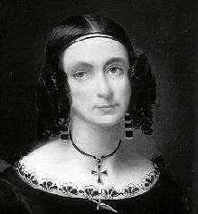 Louise Bertin (1805-1877), French composer